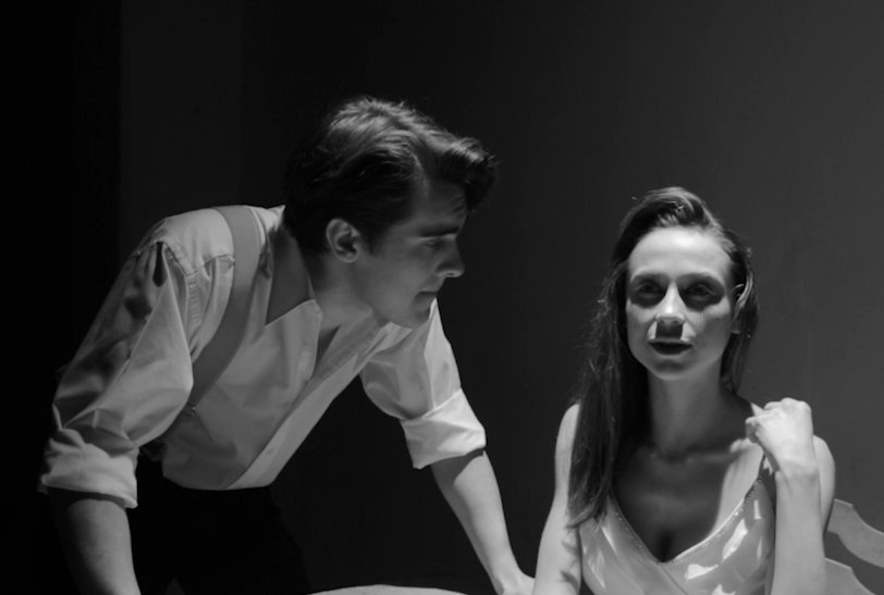 Кадр з промо-ролика вистави «Ніч 16 січня» Чесного театру, сцена із допитом Карен Андре